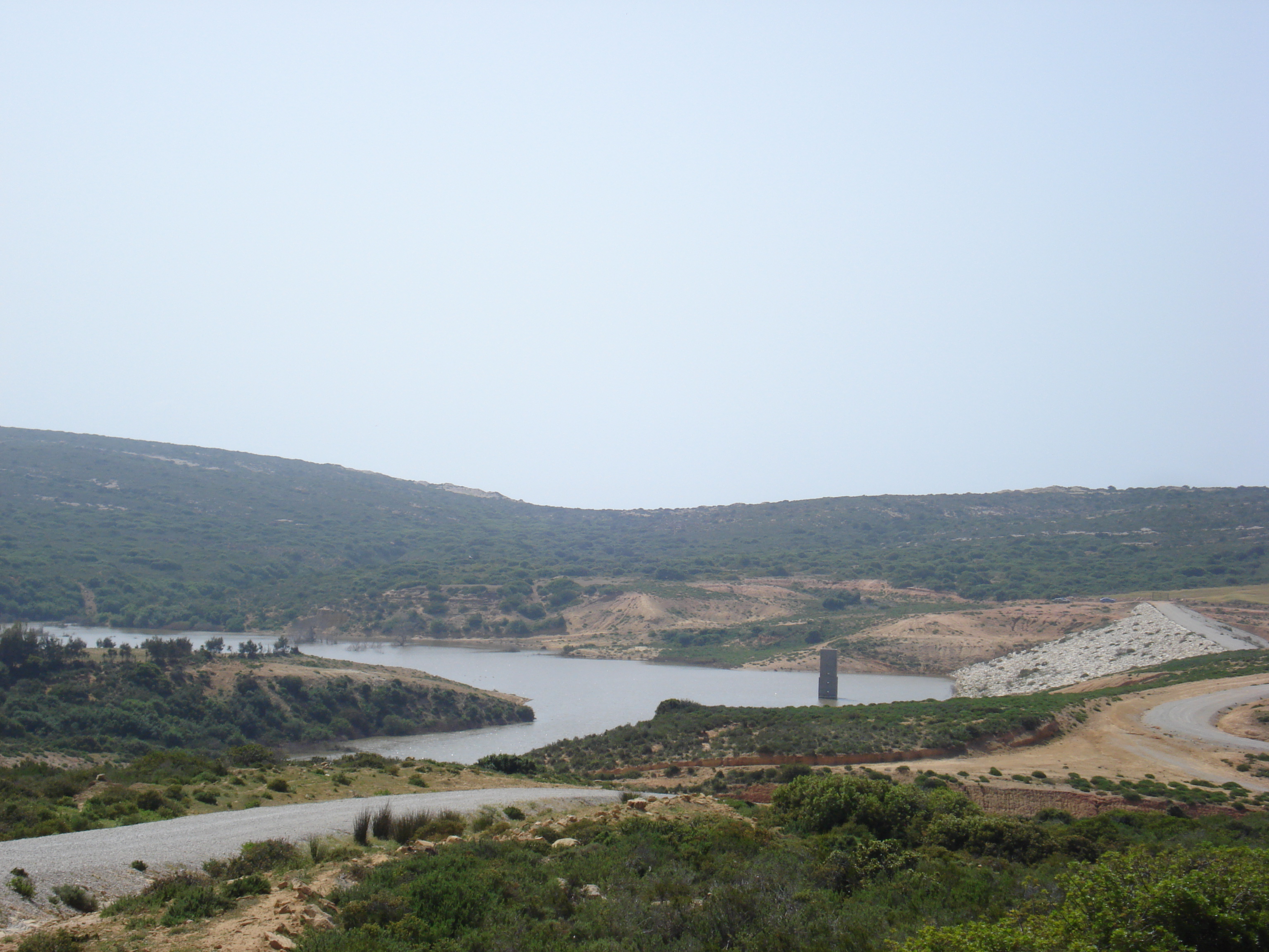 Barrage El Hammam, Gouvernerat de Nabeul, Tunisie